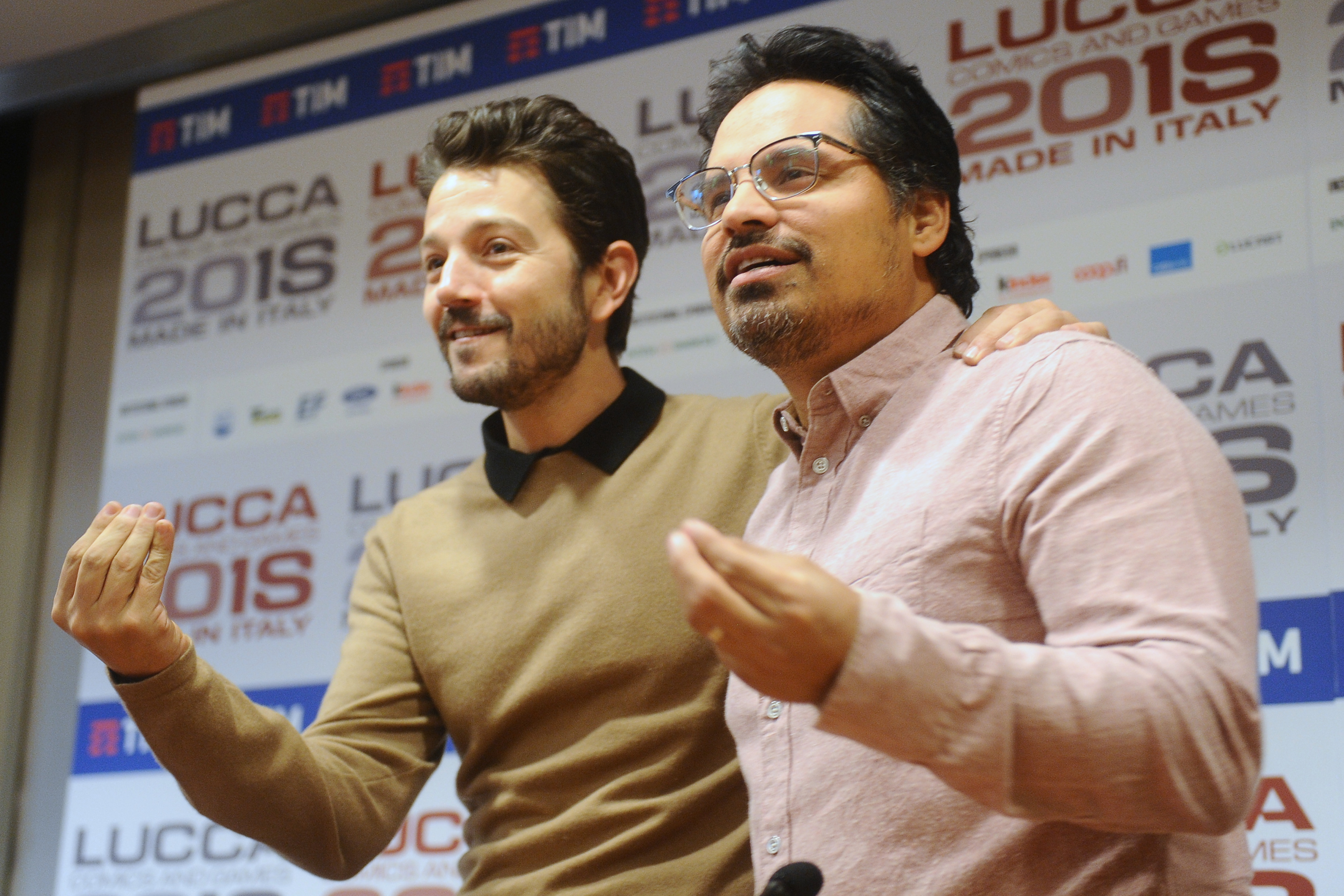 Diego Luna e Michael Peña, protagonisti di Narcos: Mexico a Lucca Comics & Games. Conferenza stampa in Camera di Commercio.